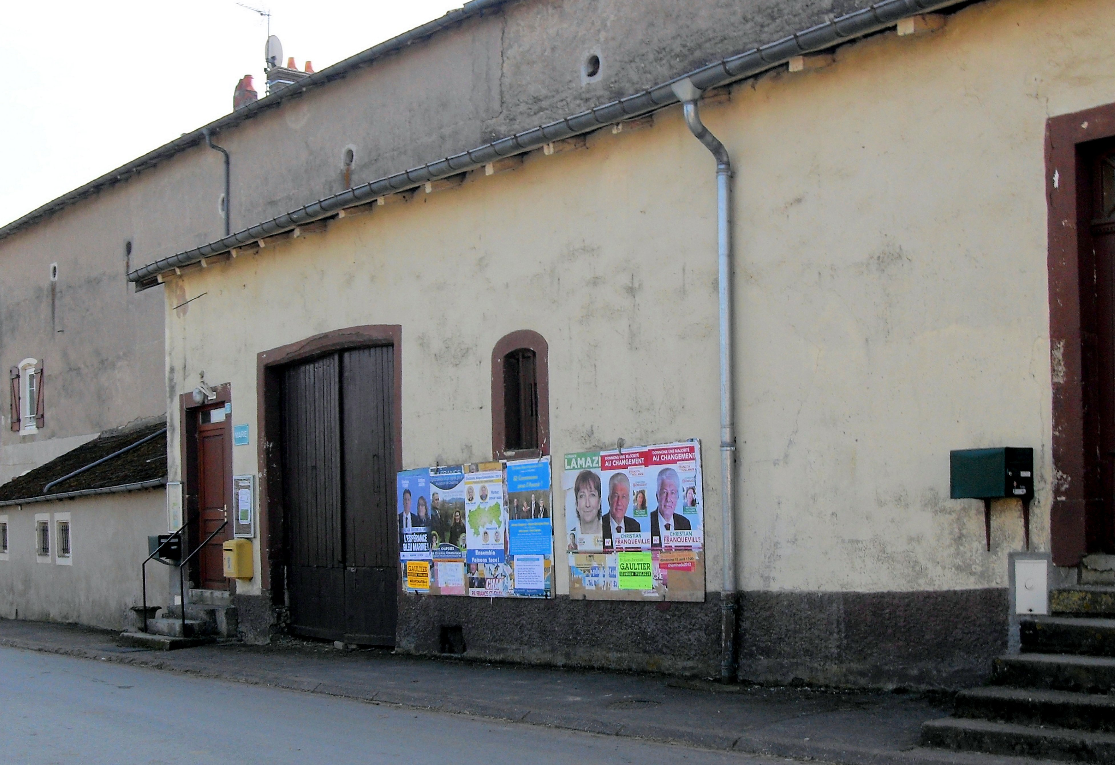 La mairie de Marainville-sur-Madon